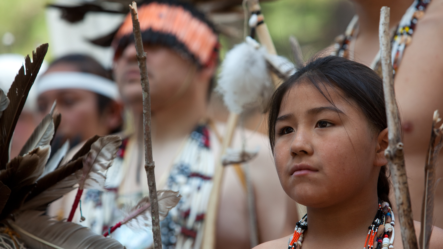 Winnemem Wintu Dancers